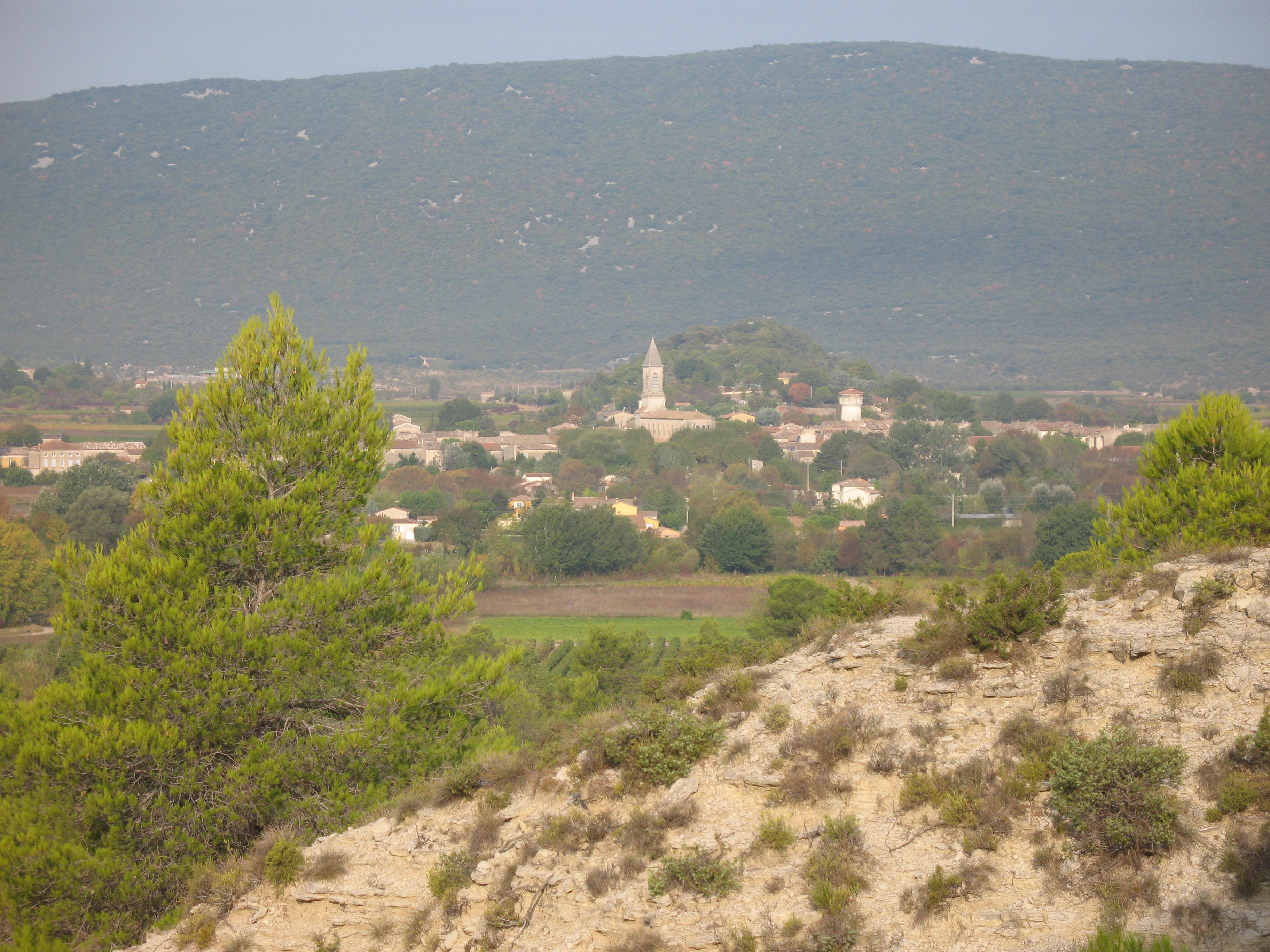 Vue générale de Pompignan (Gard) depuis le mont Saint-Jean